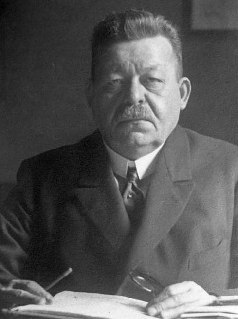 Zum 25. Todestag des ersten deutschen Reichspräsidenten Friedrich Ebert am 26. Februar 1925 Letzte Aufnahme des Reichspräsidenten Ebert, photographiert am 15. Februar, vor 14 Tagen an seinem Schreibtisch.